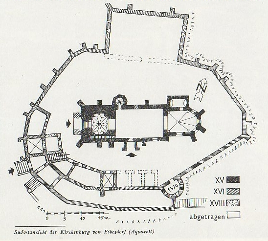 Planul fortificatiei din Ighisul Nou.